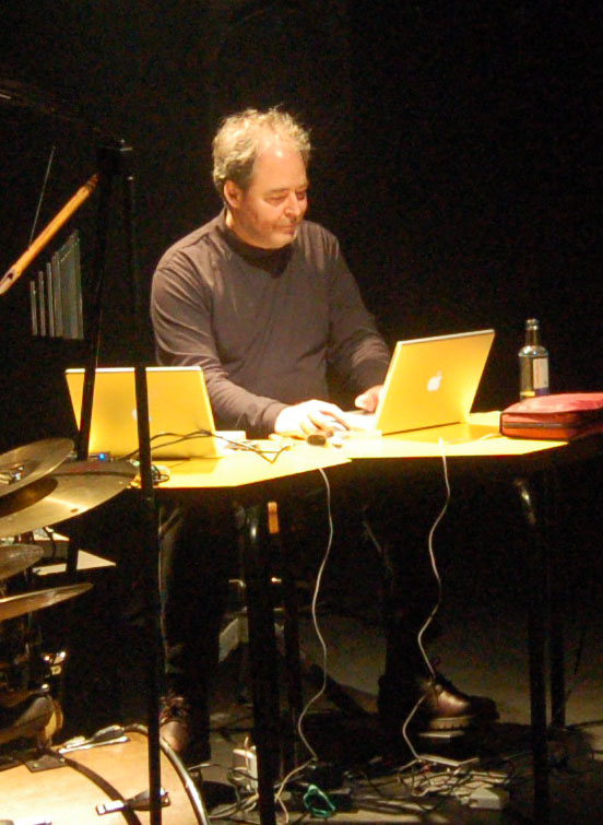 Wade Matthews en concerto na sala Nasa de Santiago de Compostela